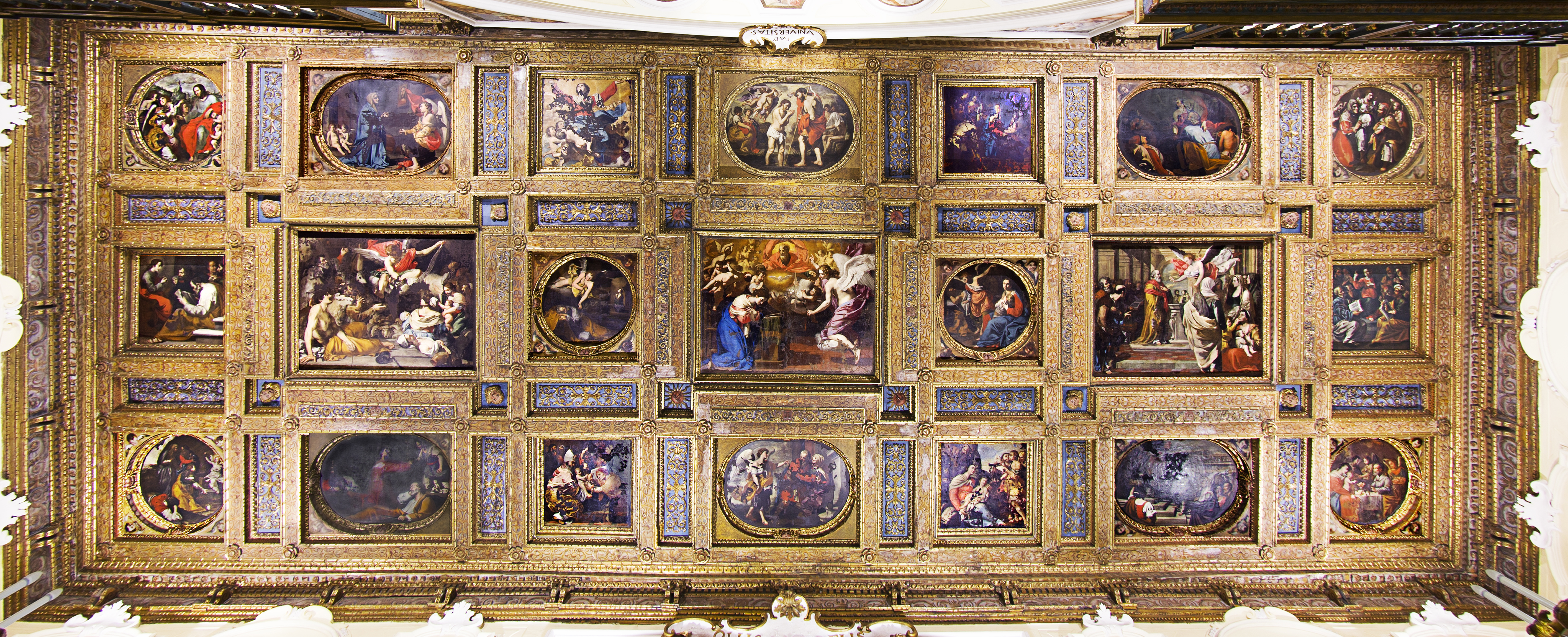 Cassettonato di Francesco Guarini del transetto della collegiata di San Michele, Solofra (AV)